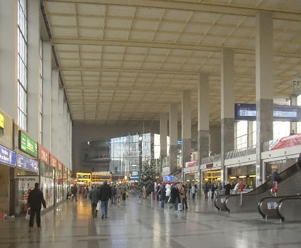 Beschreibung: Untere Halle des Wiener Westbahnhofes. Rechts sieht man den Aufgang zu der den Gleisen vorgelagerten oberen Halle; links befinden sich die Ausgänge zum Europaplatz. Quelle: eigenes Foto vom 6. Dezember 2004 Fotograf: Benutzer:Wolfgang glock Andere Versionen